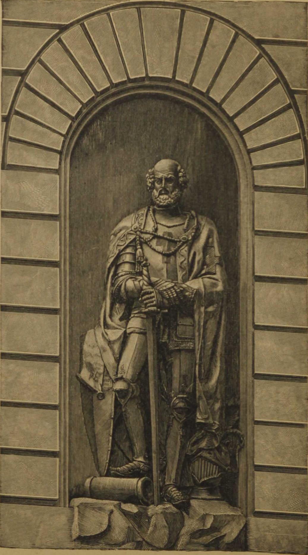 Wolter von Plettenbergi kuju Liivimaa Rüütelkonna hoonel